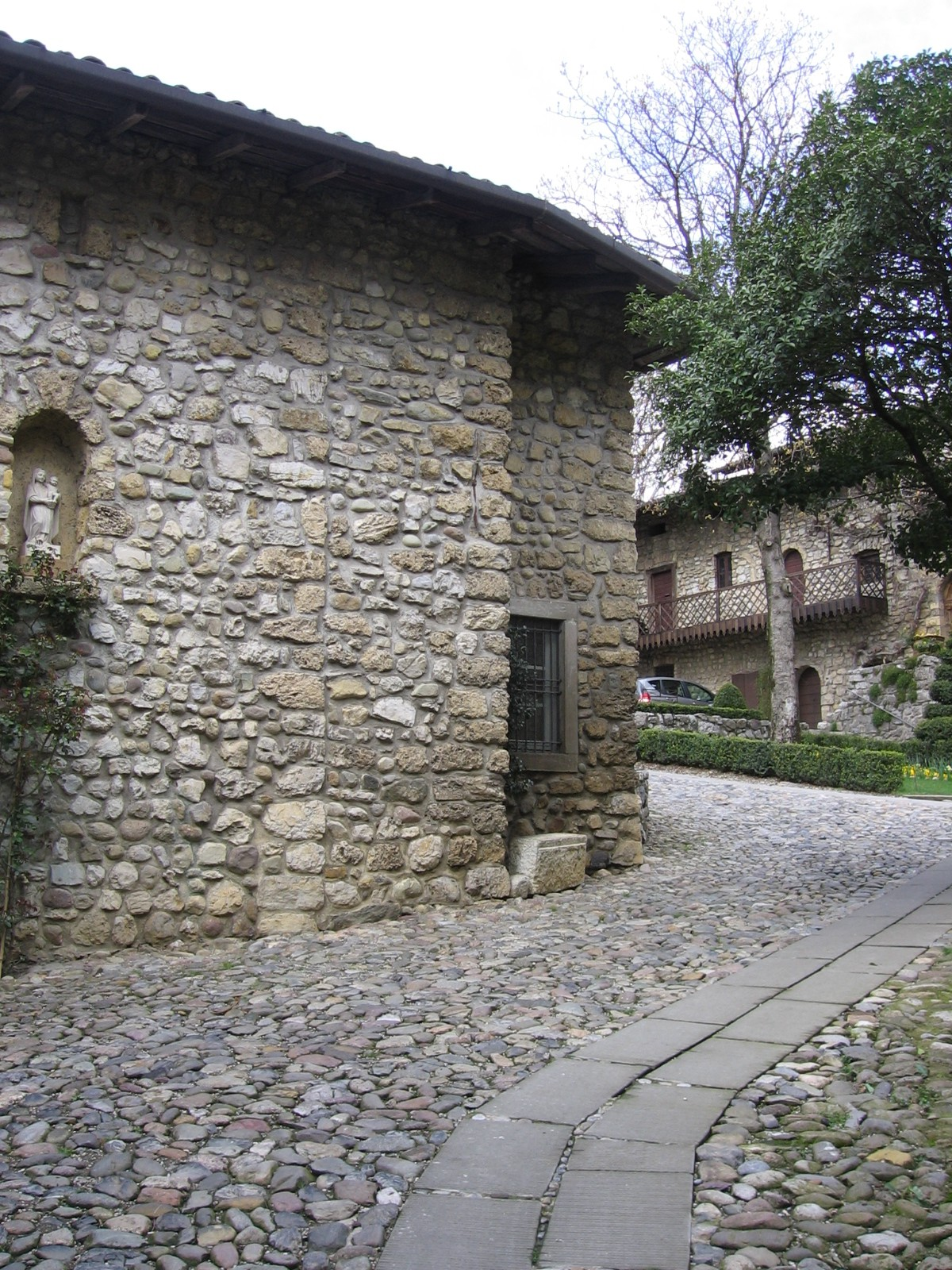 Monasterolo del castello, Bergamo, Italia